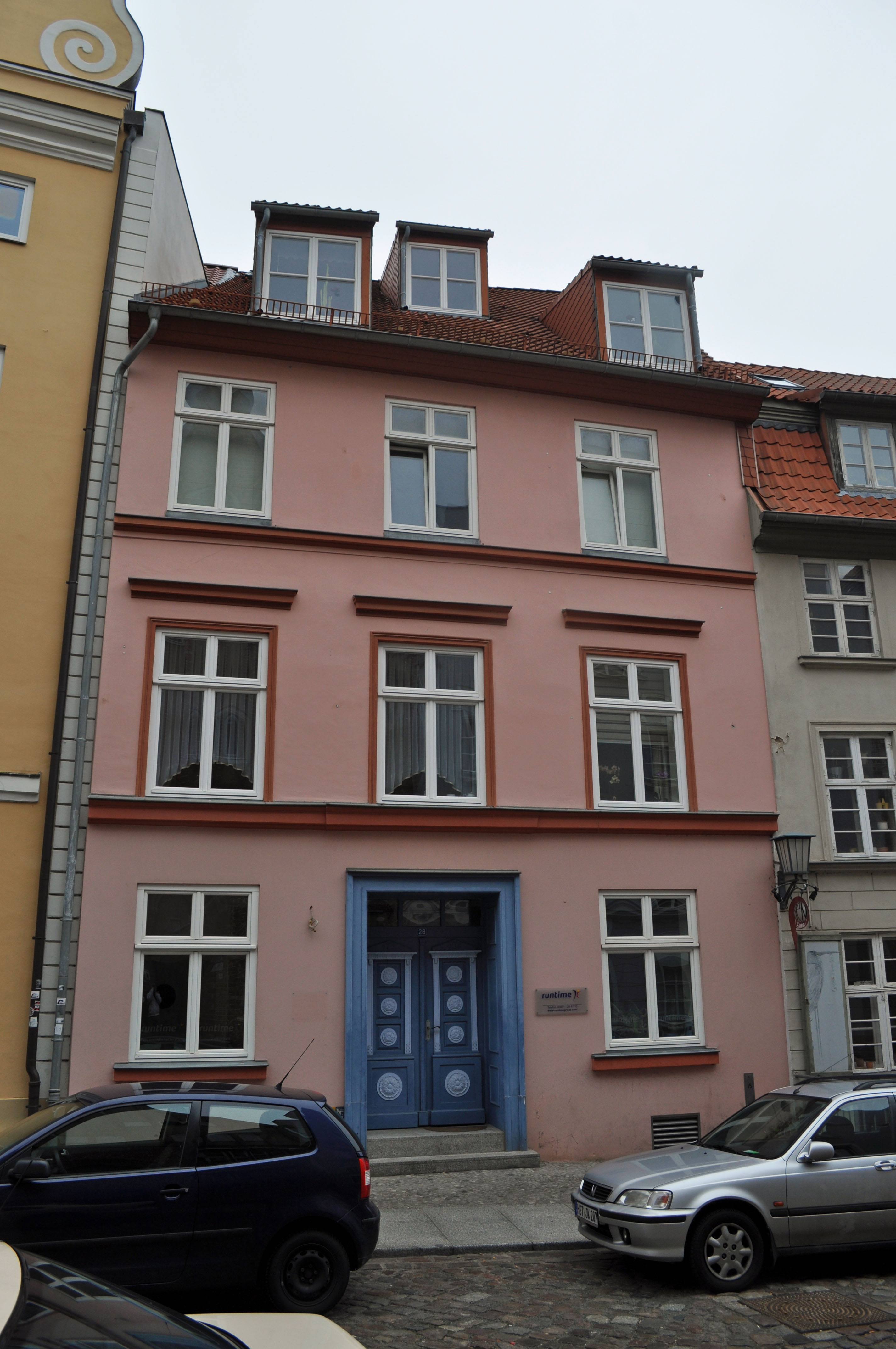 Gebäude bzw. Gebäudedetail in Stralsund. Straße und Hausnummer siehe Dateiname.